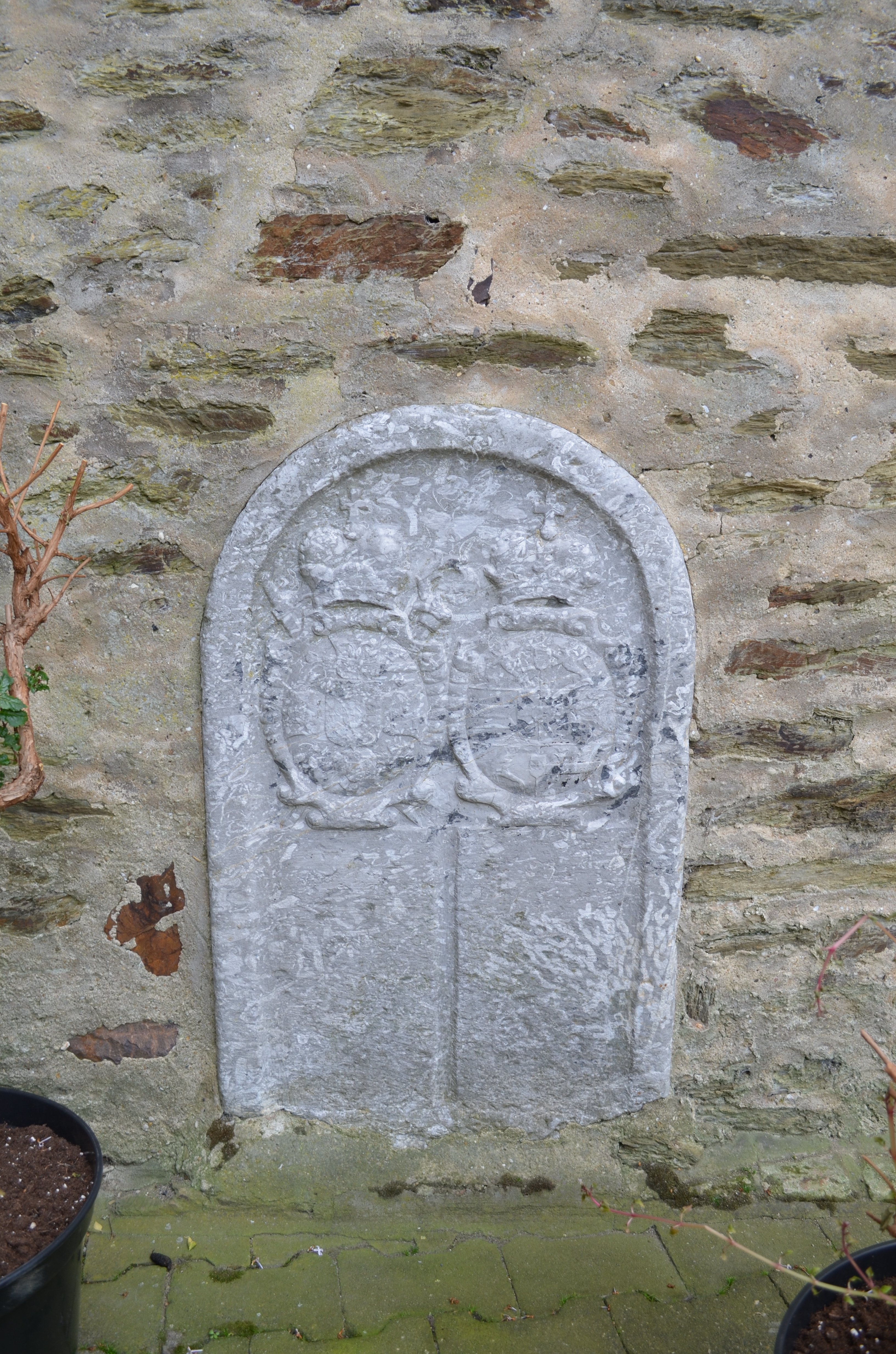 Bad Camberg, Am Amthof 4